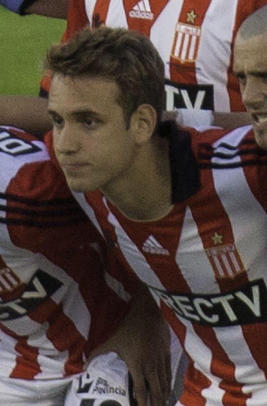 Estudiantes de La Plata starting XI against Penarol in Copa Sudamericana 2014.